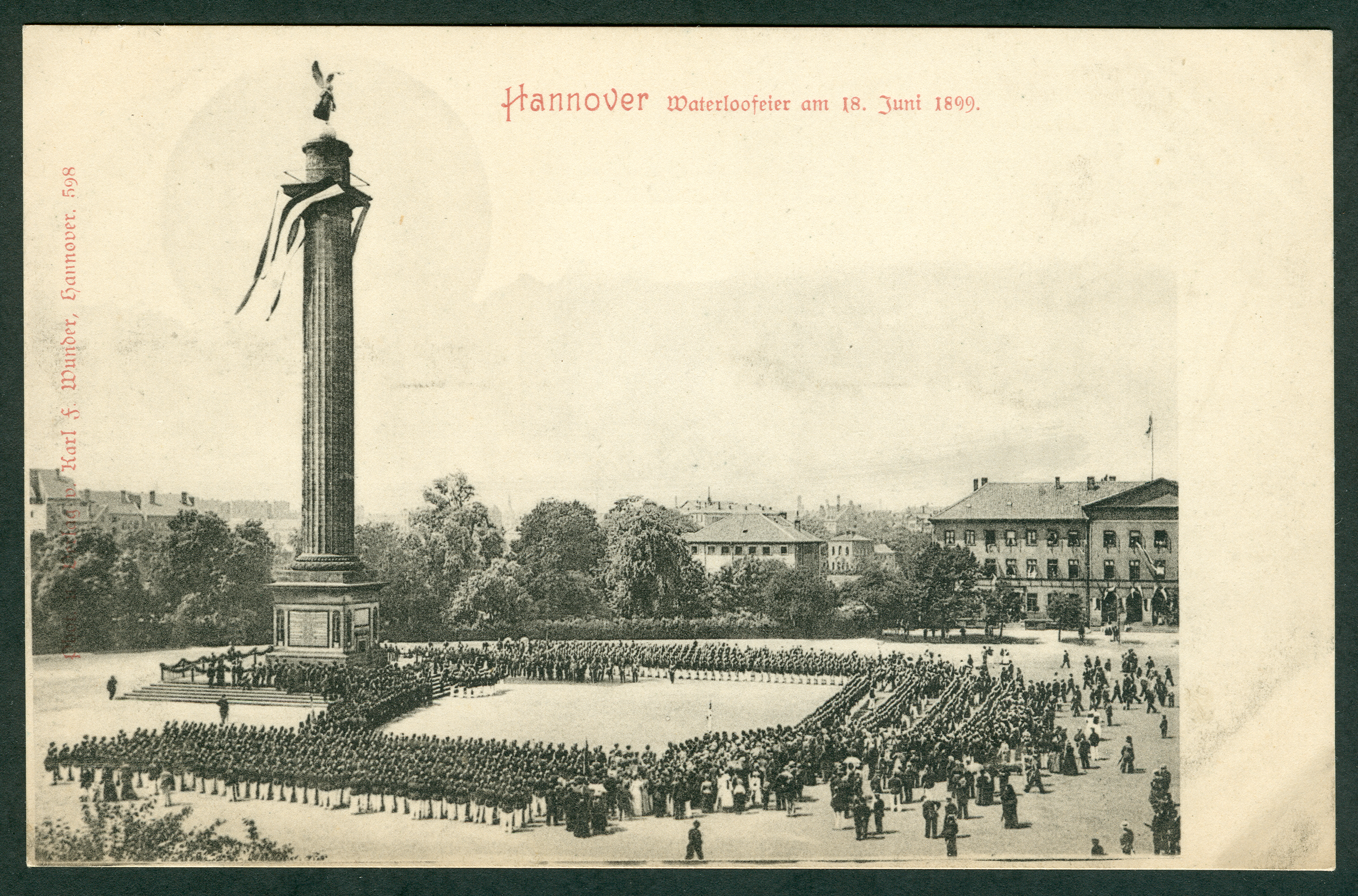 Ansichtskarte von Karl Friedrich Wunder